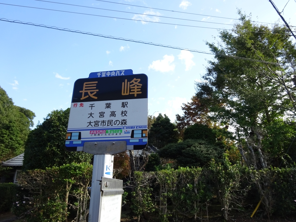 長峰バス停